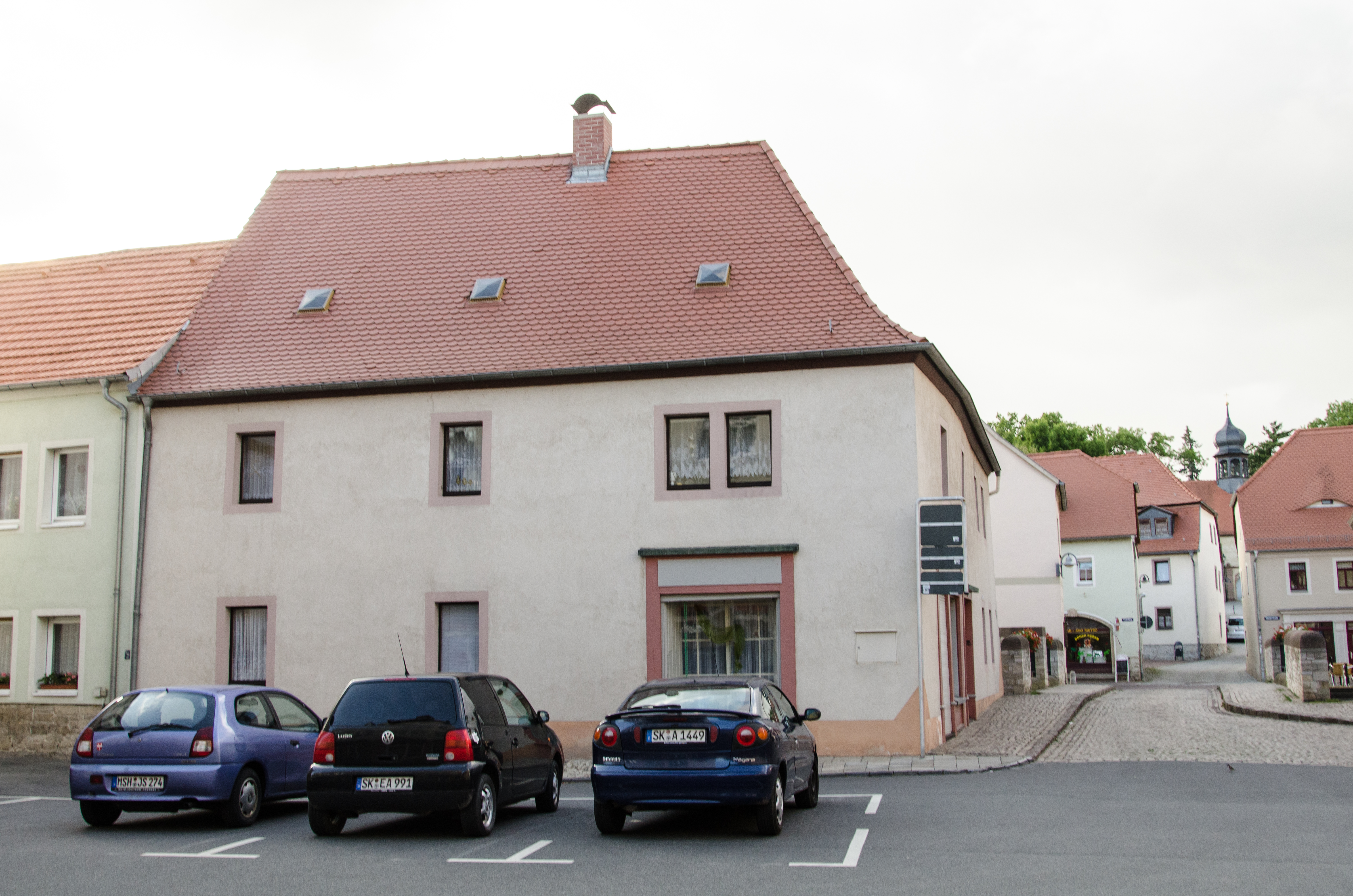 Querfurt, Matzplatz 5